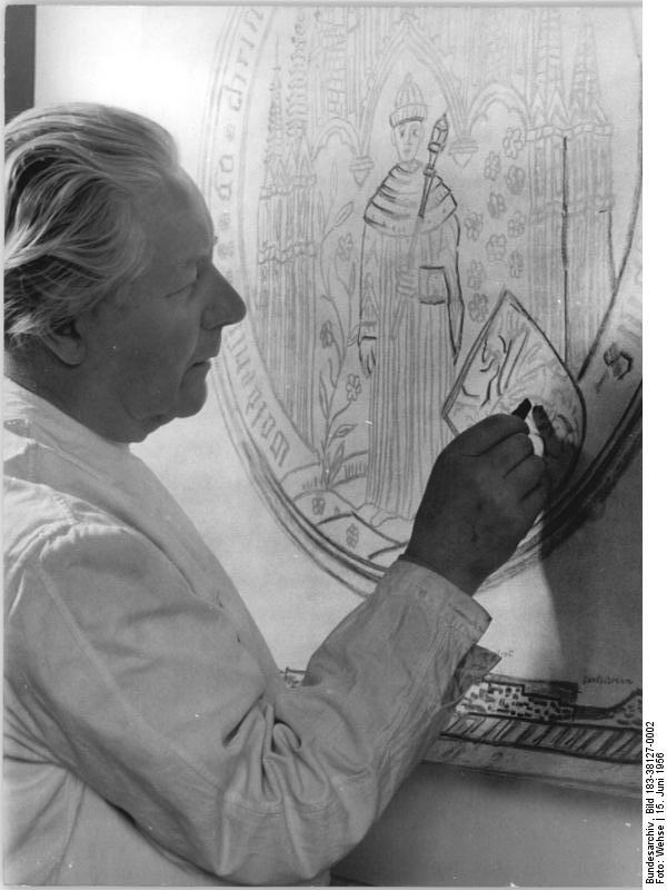 Weimar, Professor Peter Keler Universitätssiegel malend Zentralbild Wehse-Erfurt Wjt-Th 15.6.1956 Aus der Arbeit eines wissenschaftlers der Deutschen Demokratischen Republik Professor Peter Keler, Weimar, Hochschule für Architektur und Bauwesen Prof. Peter Keler, seit 1945 an der Hochschule für Architektur und Bauwesen in Weimar tätig, ist gleichzeitig Leiter der Abteilung "Optische Pädagogik" und "Museumsgestaltung", Prof. Peter Keler, arbeitet z. Zt. an der Gestaltung der in Zürich vom 20.8.-26.8.1956 stattfindenden internationalen Ausstellung "Die Landschaft im Leben unserer Zeit", die im Rahmen des "V. Internationalen Kongresses der Garten- und Landschaftsarchitekten" dort durchgeführt wird. Die Sektion Landschafts- und Gartengestaltung des Bundes der Deutschen Architekten hat Prof. Keler mit der ehenvollen Aufgabe betraut, den Ausstellungsteil der DDR auf dieser Schau künstlerisch zu gestalten. Prof. Keler arbeitet z. Zt. an einer vergrösserten Darstellung des Universitätssiegels aus der Gründungszeit der Universität Greifswald. Dieses Siegel wird in der schönen Farbigkeit des Originals reliefartig vom Modellhauer Erich Harz gearbeitet. Es soll noch zur diesjährigen Jubiläumsfeier der Universität den Raum des Rektors schmücken. UBz: Prof. Keler legt den Querschnitt der Reliefs fest. Abgebildete Personen: Keler, Peter Prof.: Hochschule für Architektur und Bauwesen Weimar, DDR